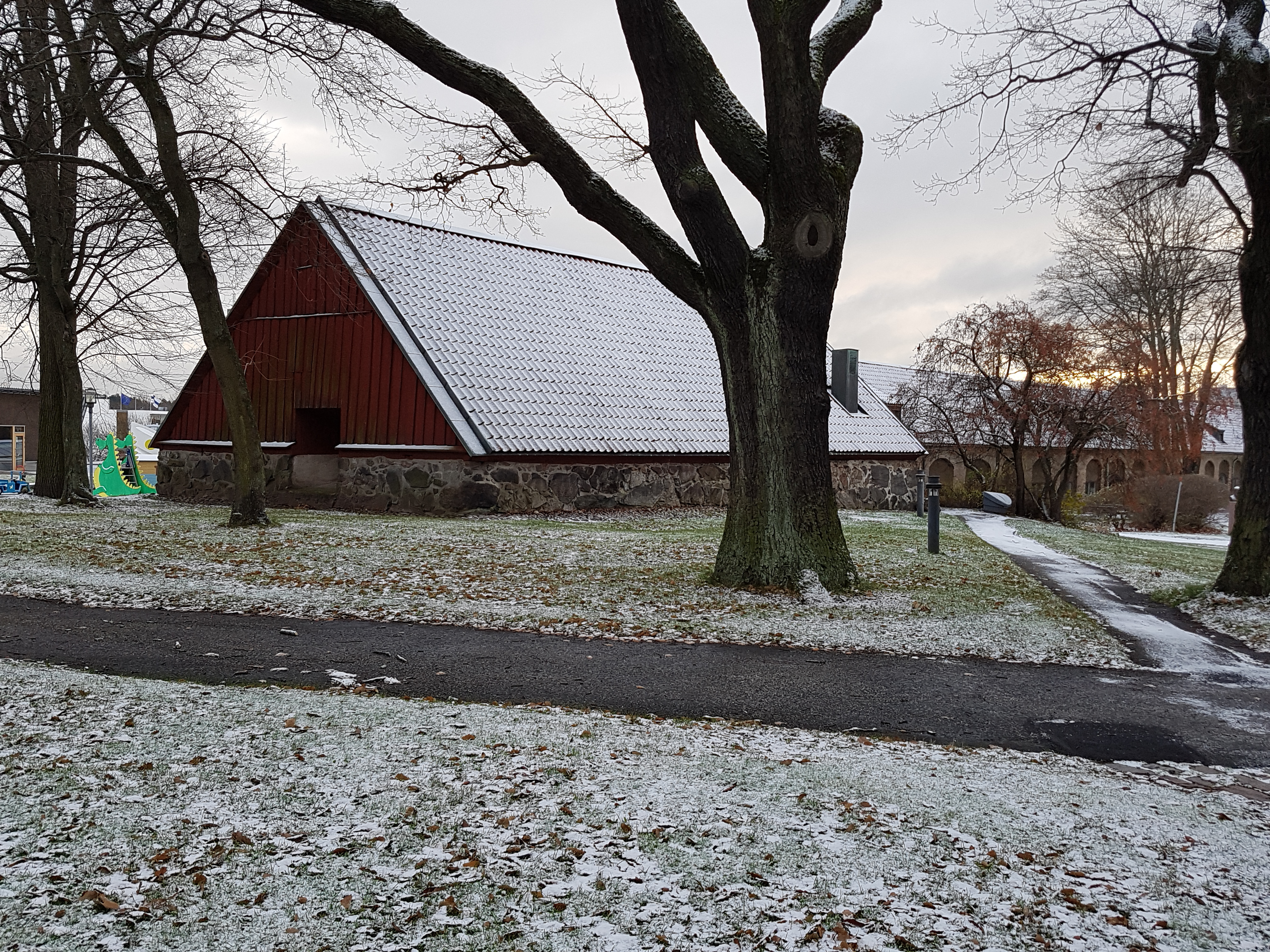 Krutkällaren i Radiohusparken i Stockholm.